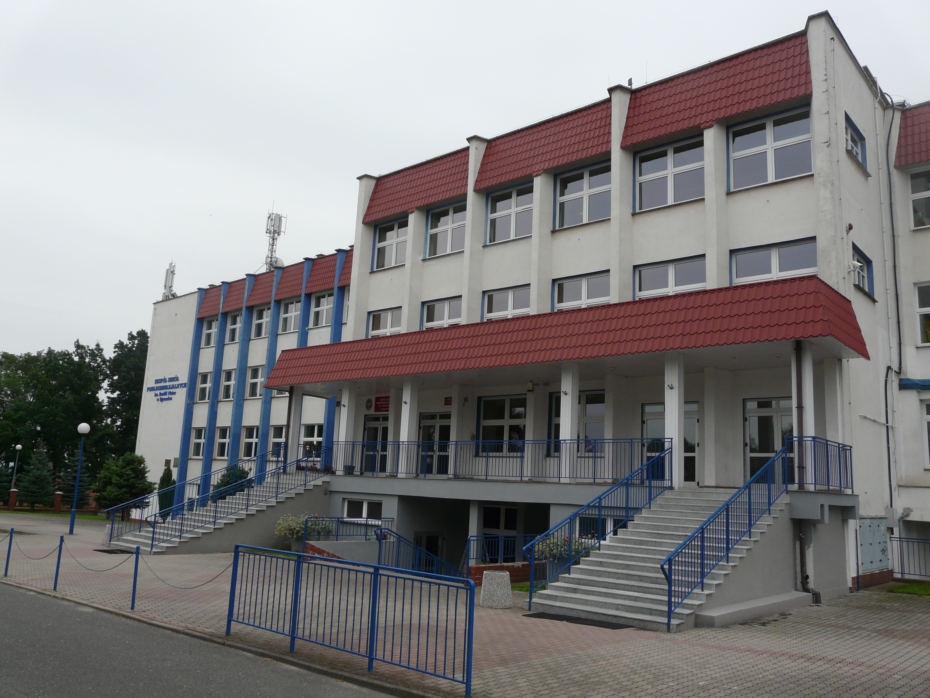 Zespół Szkół Zawodowych